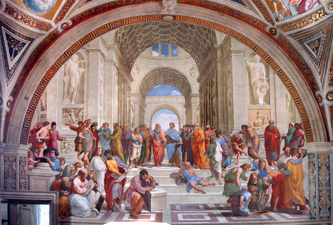 A Escola de Atenas, afresco no Vaticano